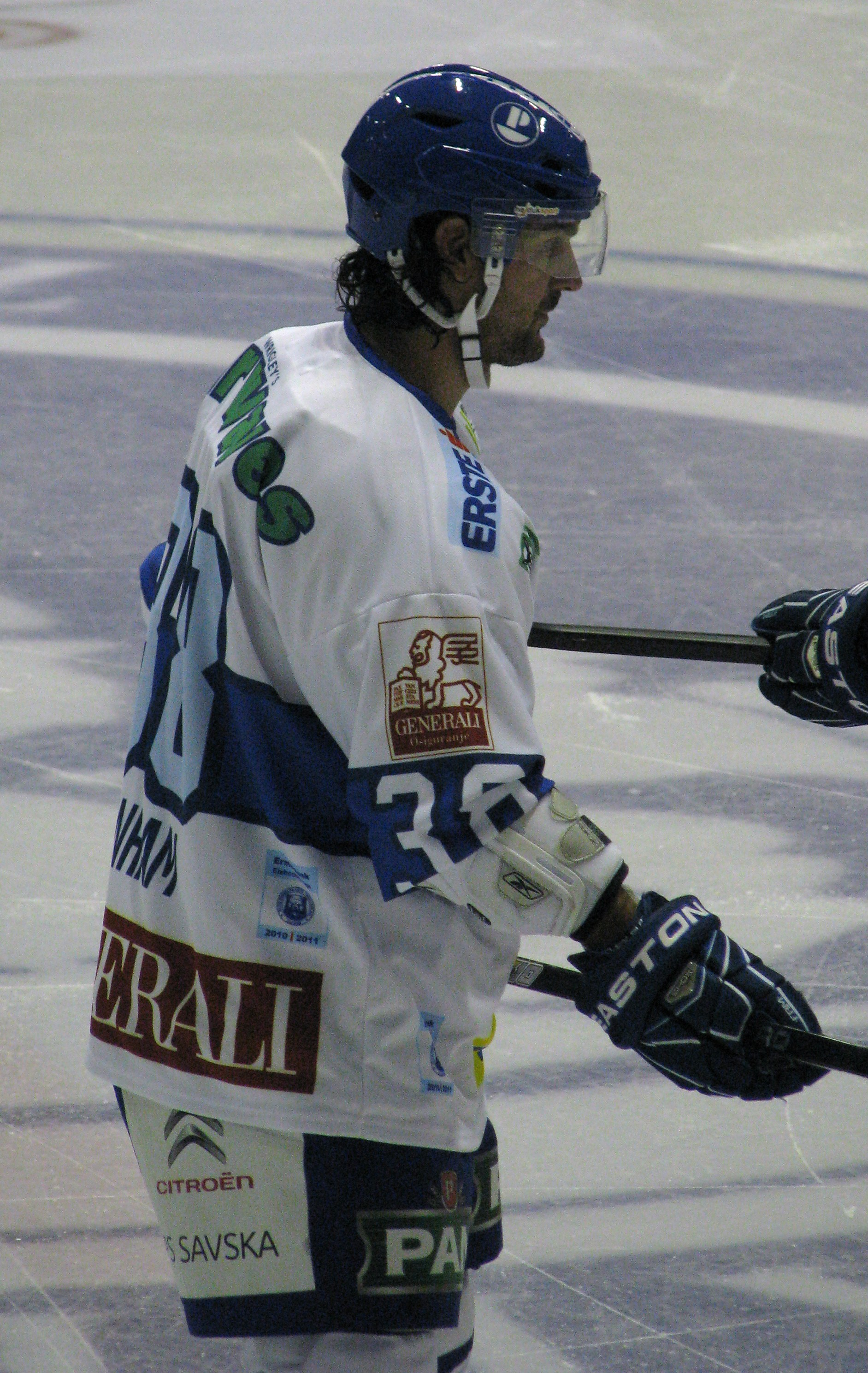 Frank Banham